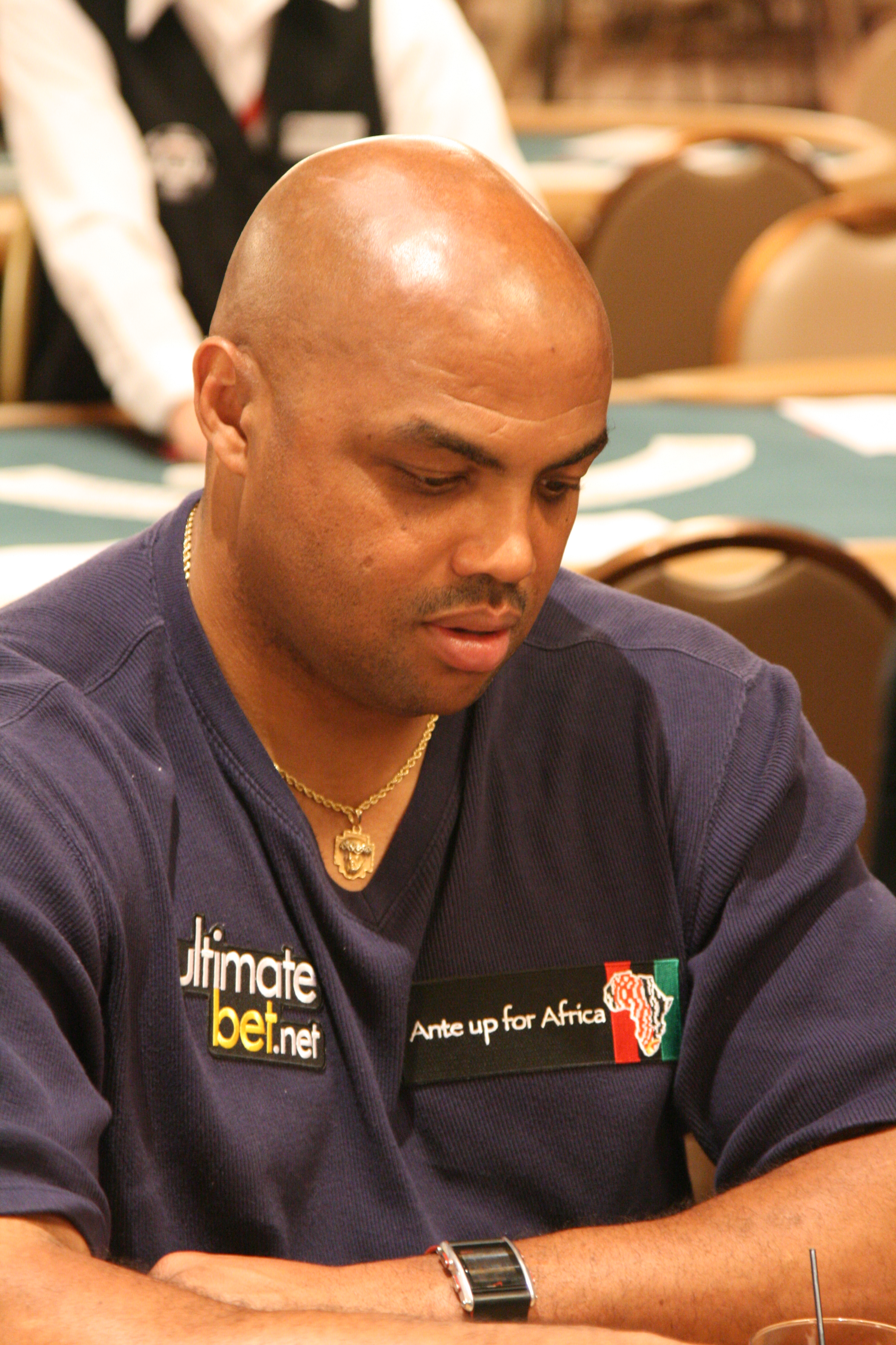 charlesbarkely7-2-1